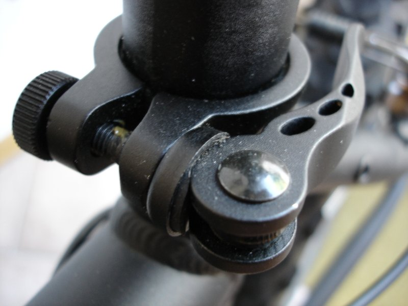 Bild einer Sattelklemme mit Schnellspanner.